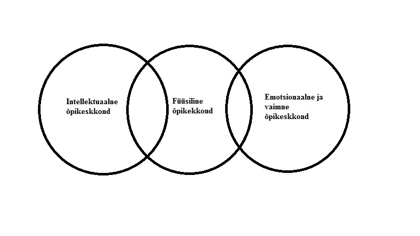 Õppikeskkondade liigid ja nende seos üksteisega